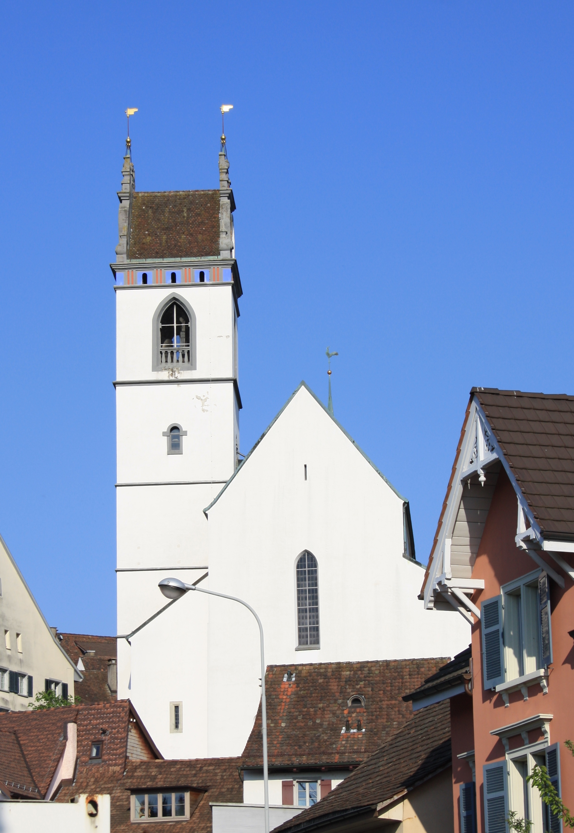 Stadtkirche Aarau